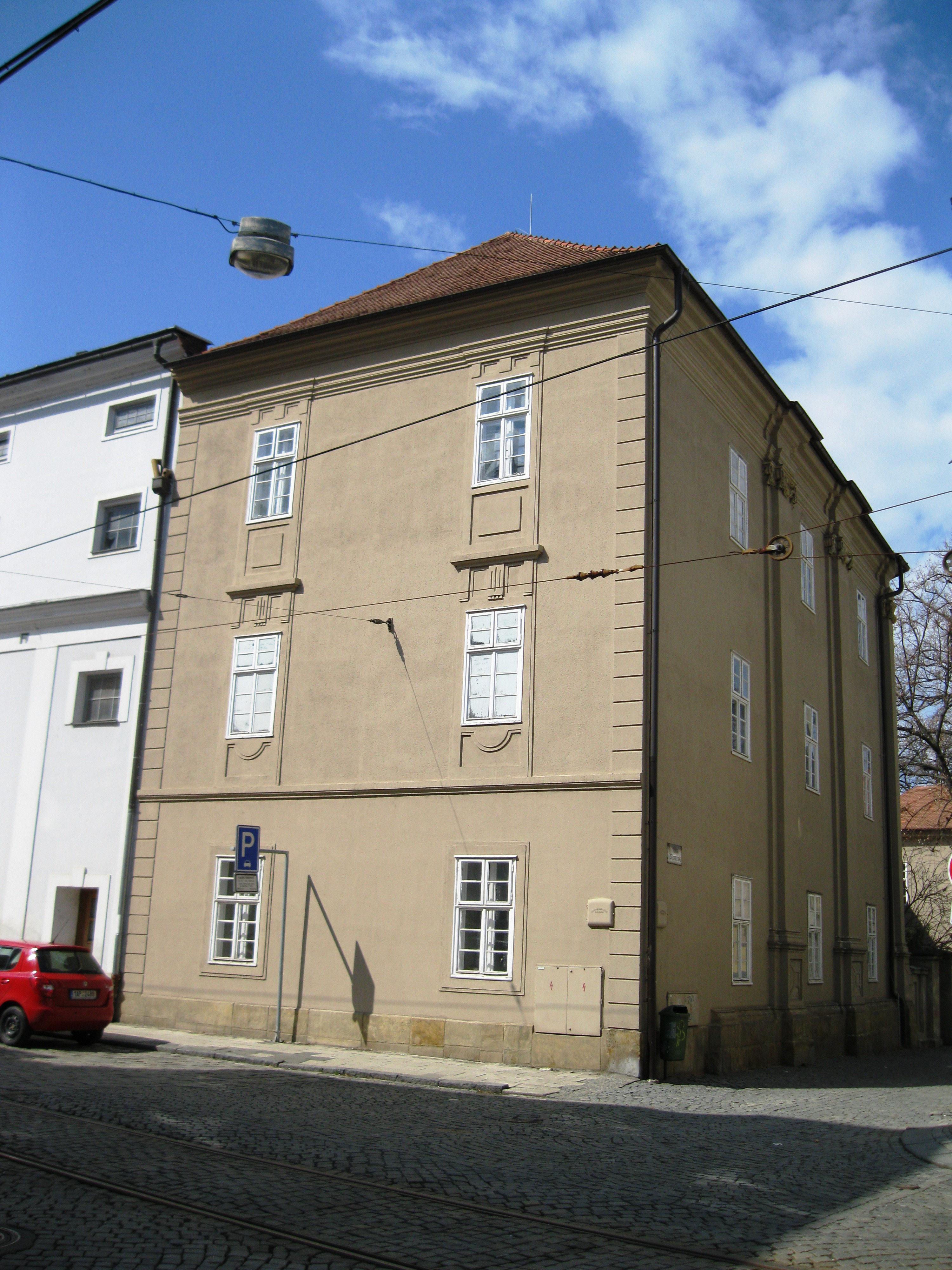 Zrušený kostel Svatých schodů), Sokolská 587/17, Slovenská 587/5, Olomouc